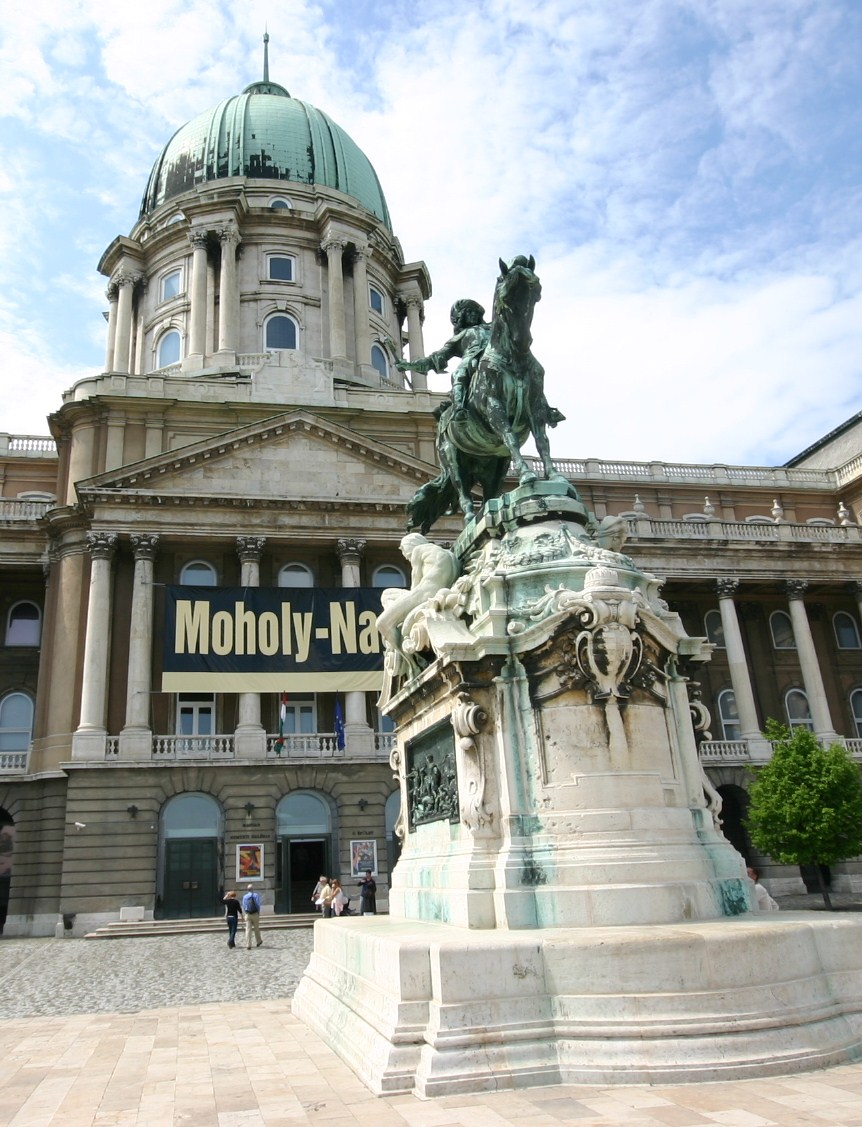 Prinz Eugen Statue am Budapester Königspalast